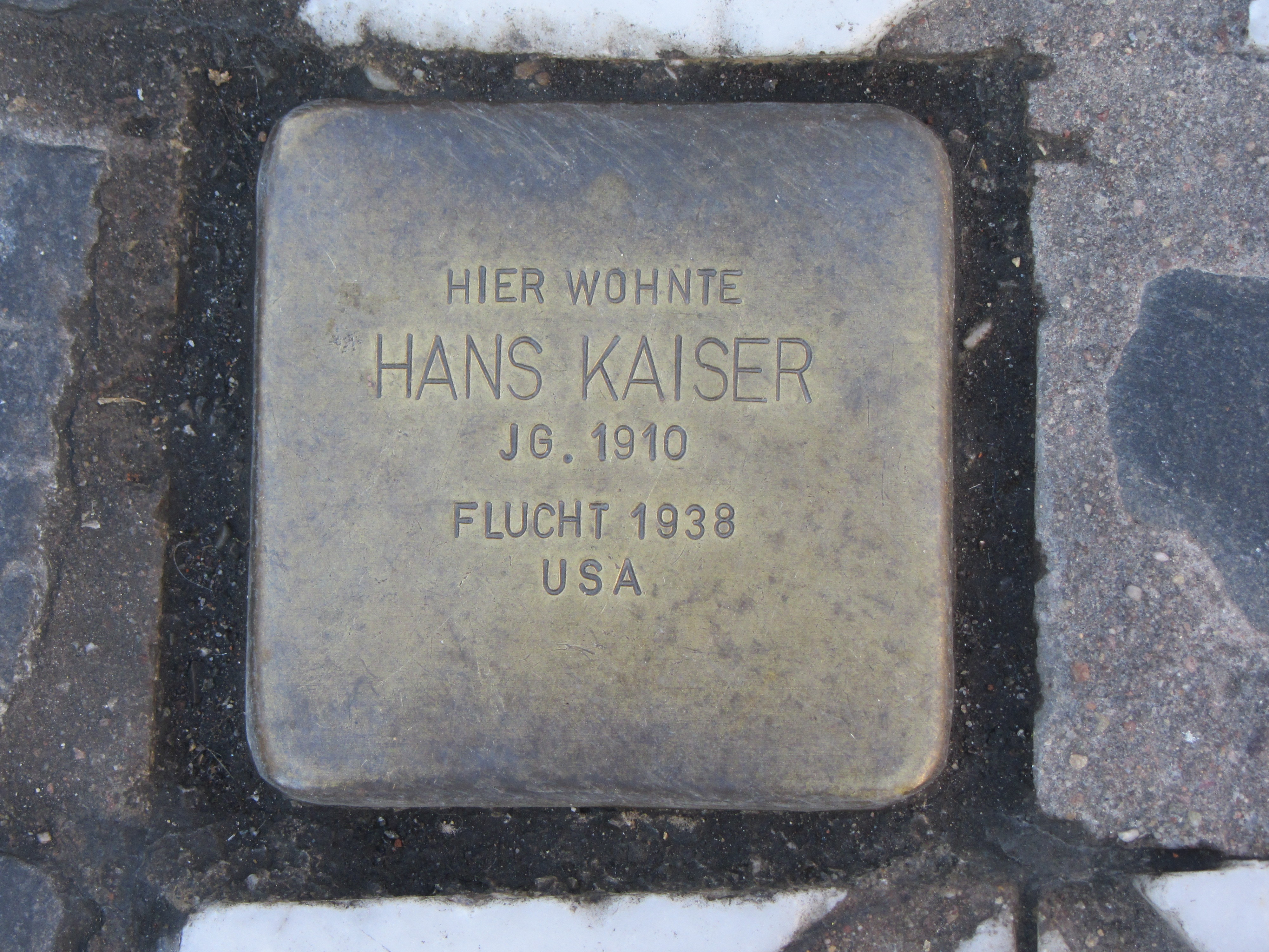 der Stolperstein für Hans Kaiser vor dem Haus Scheffelstraße 15 in Singen